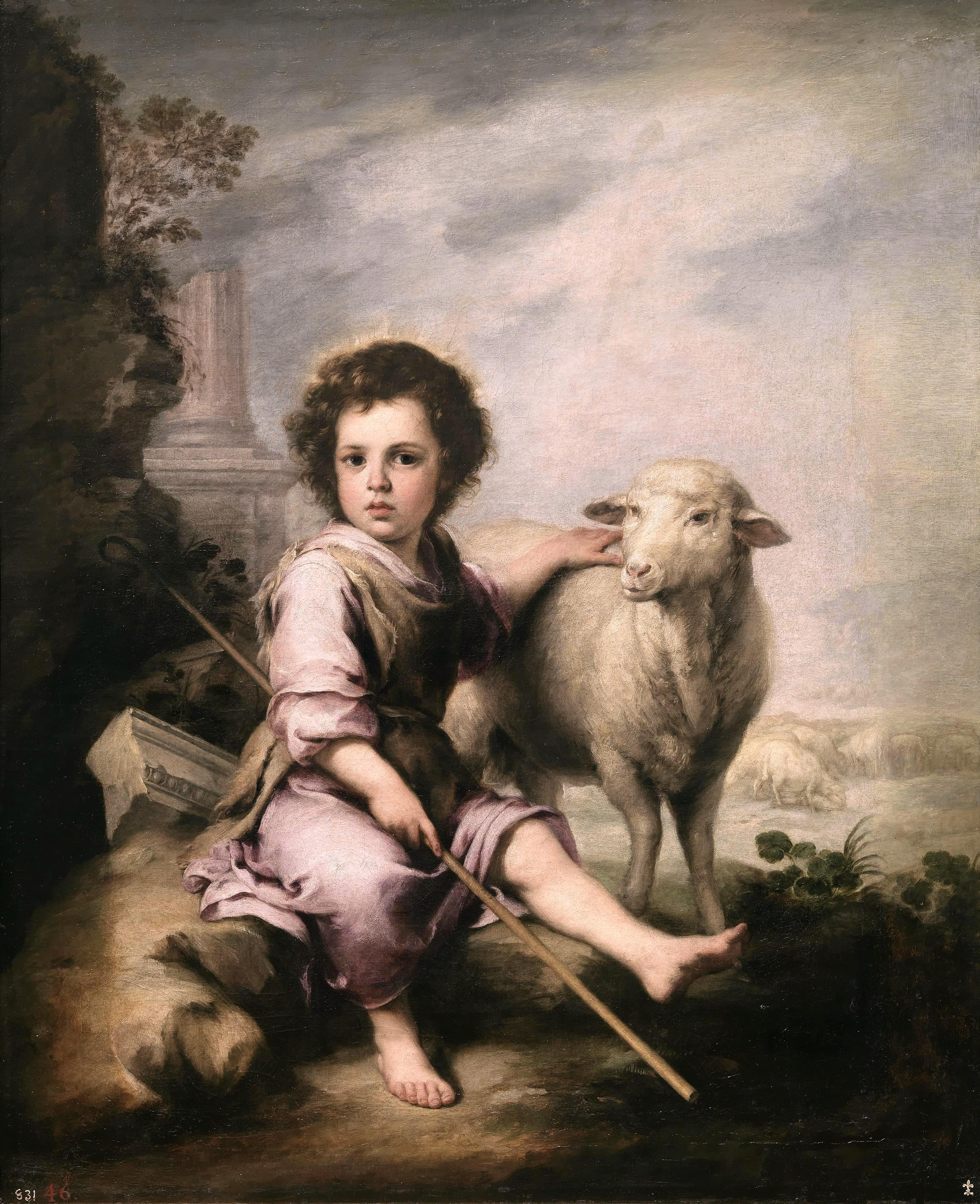 En esta obra el Niño Jesús es mostrado en relación con la metáfora bíblica del Buen Pastor que apacienta y cuida a su rebaño, y conviene señalar que Bartolomé Esteban Murillo se hizo célebre por sus representaciones de temas infantiles. Este tipo de representaciones tuvo un notable éxito la sociedad sevillana de la época de Murillo, y la «ternura y devoción» que inspiran han perdurado a través de los siglos, como señalan algunos autores. Y en esta obra, al igual que en muchas otras salidas de sus manos, Murillo destacó a la hora de combinar un estilo «sabio y delicado con un contenido amable y dulce».